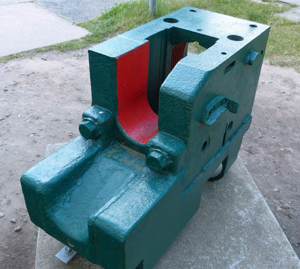 (Noch) Unbekanntes Teil eines Geschützes. Gefunden in den Dünen in Prora auf Rügen